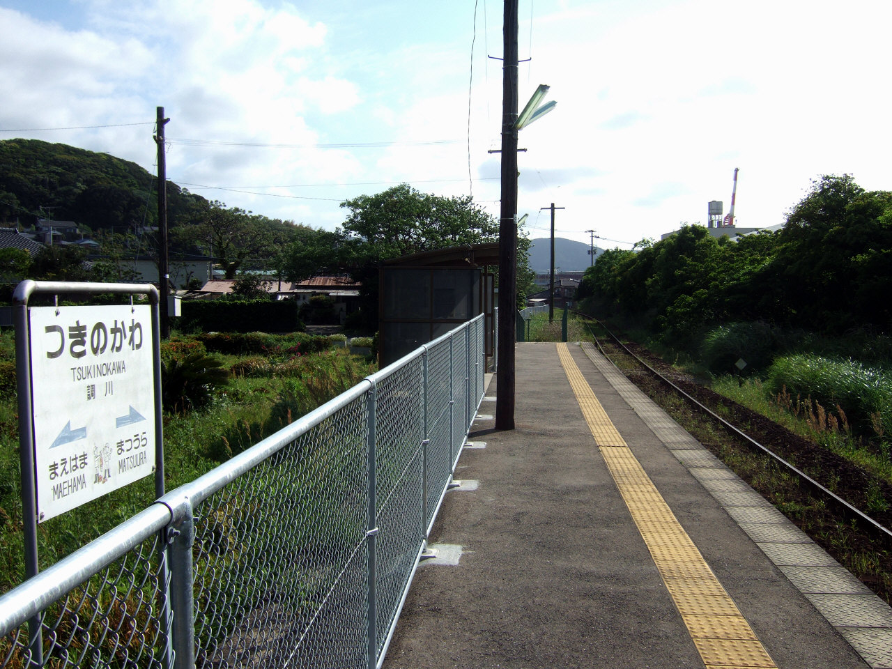 松浦鉄道調川駅（Matsuura Railway Tsukinokawa Station）